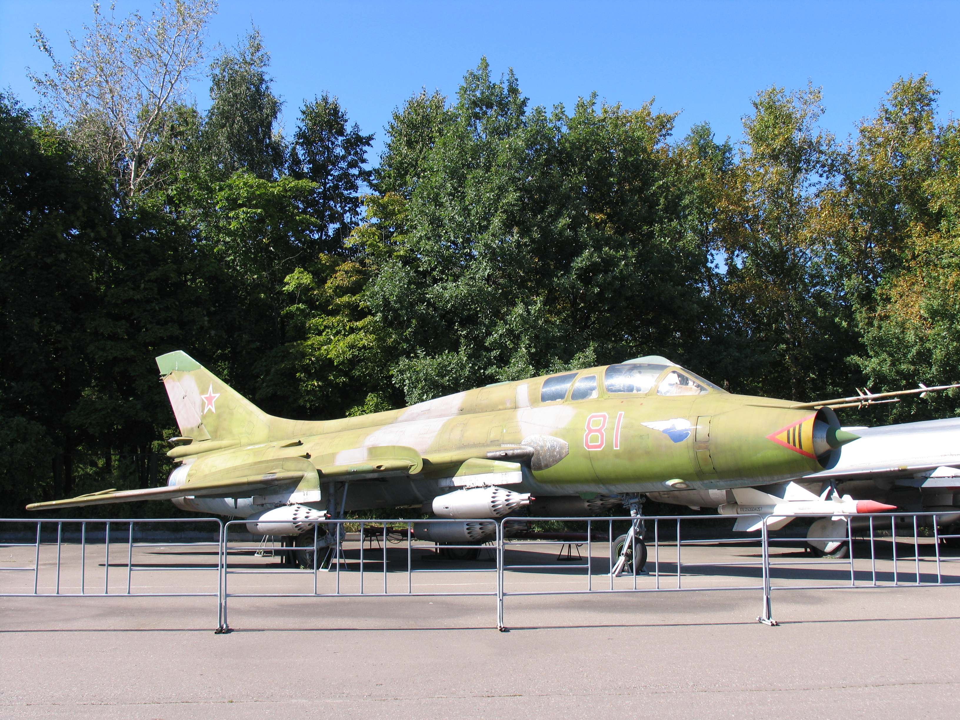 Су-17УМ3 в музее на Поклонной горе.